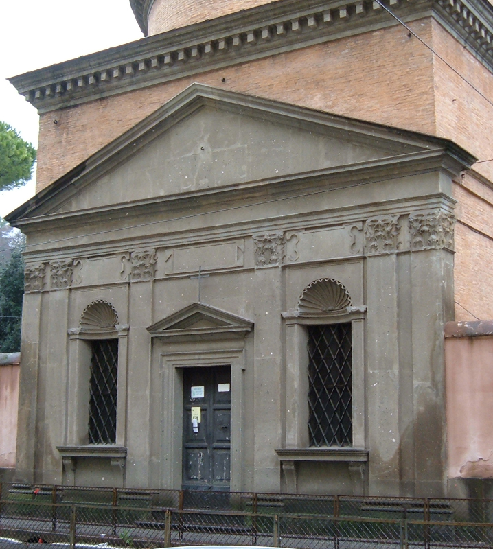 Chiesa di Sant'Andrea del Vignola, a Roma, nel quartiere Flaminio.